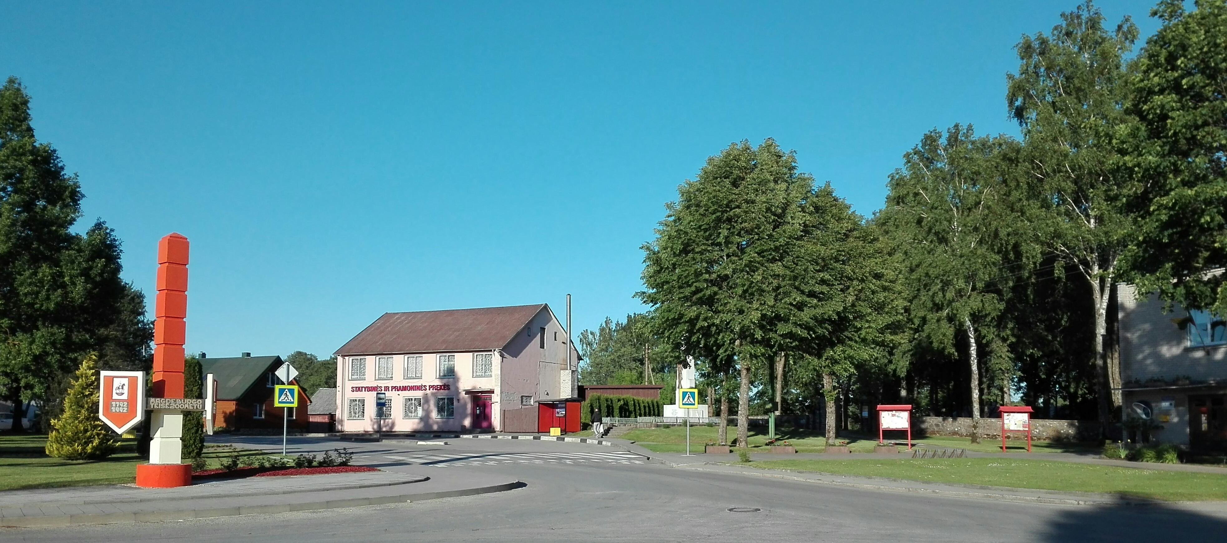 Veiviržėnų centras